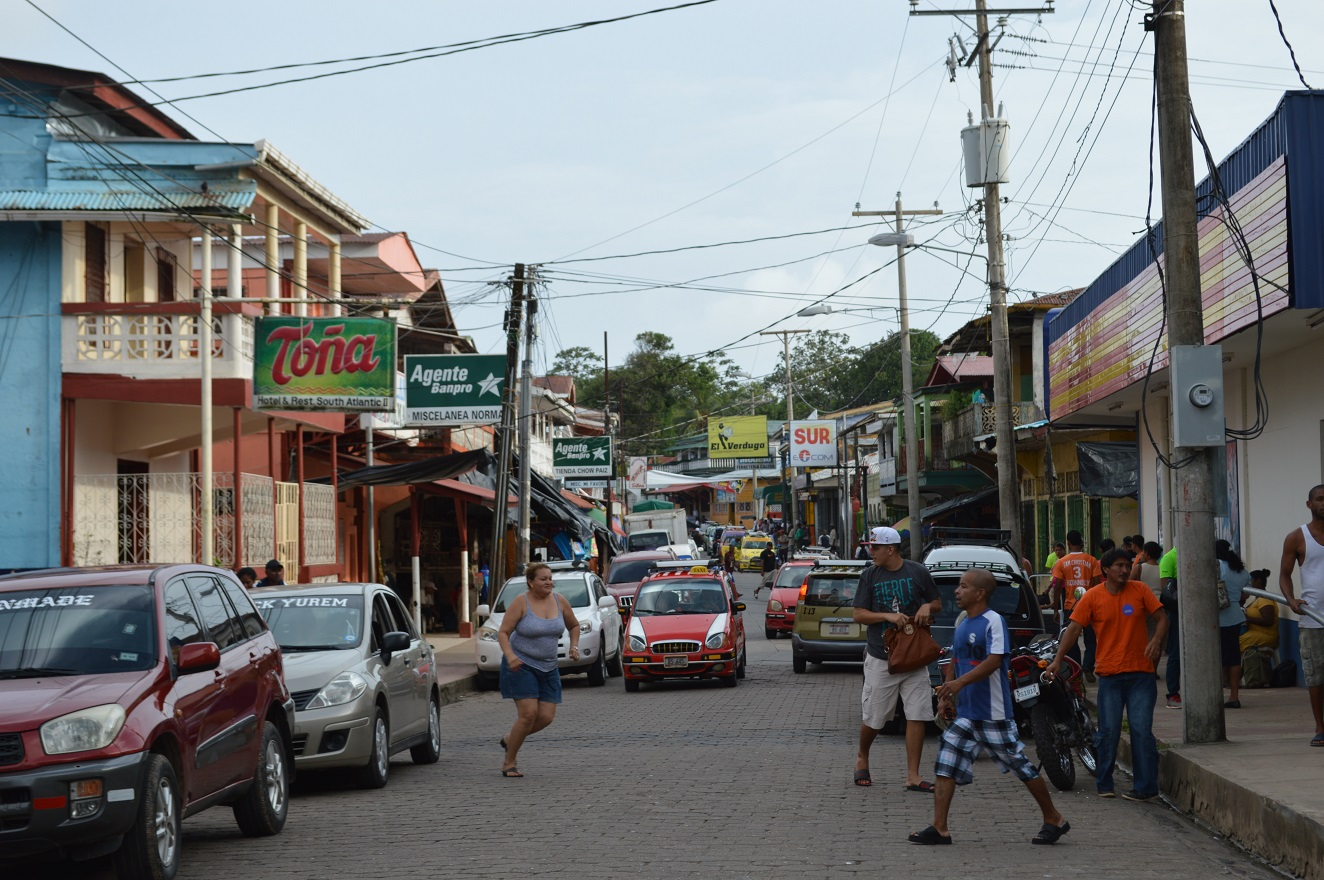 ニカラグアのカリブ海都市、ブルーフィールズ